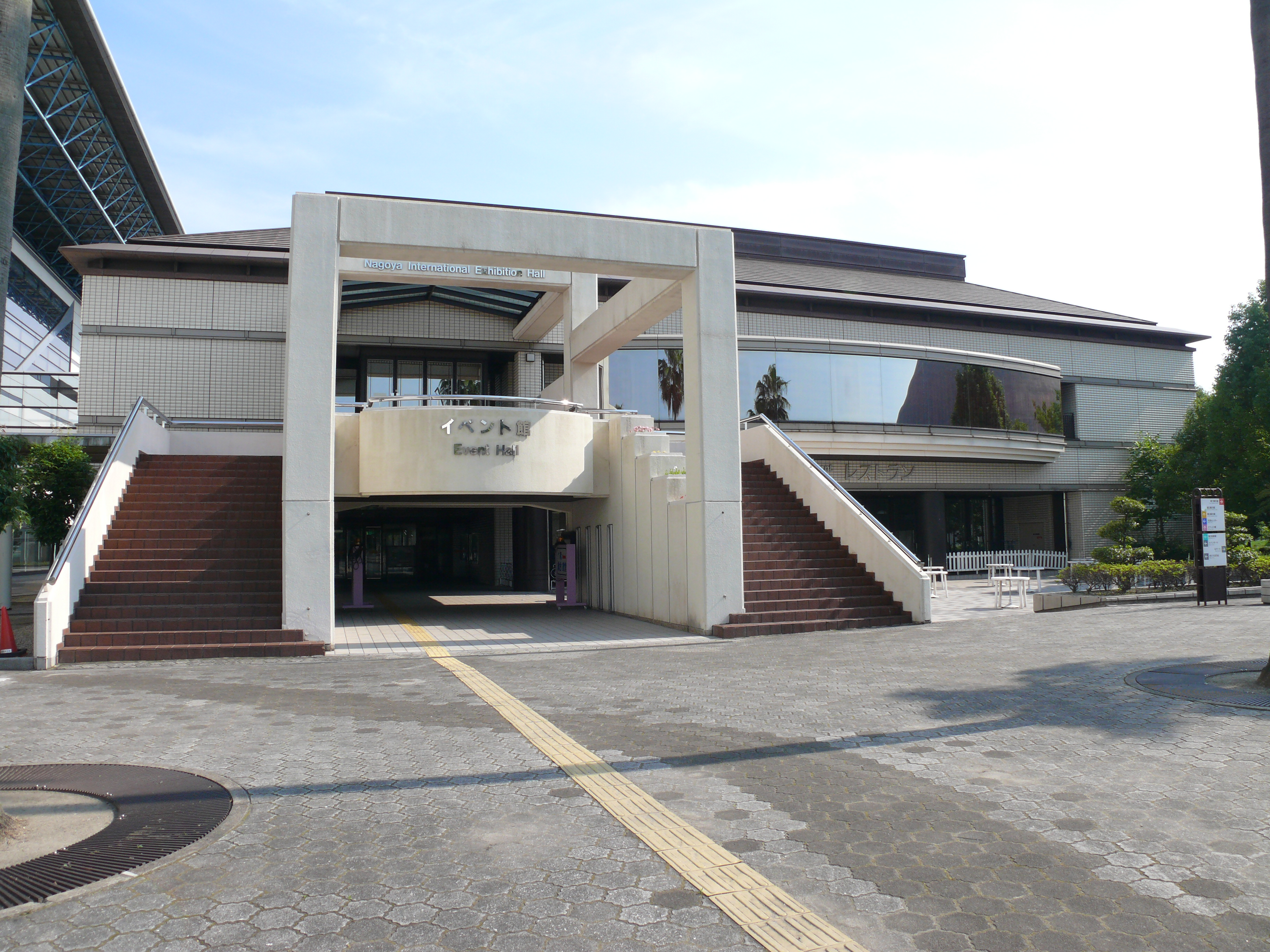 愛知県名古屋市港区にある名古屋市国際展示場（ポートメッセなごや）のイベント館。